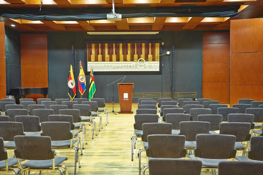 Auditorio Jesús Alberto Rey Mariño